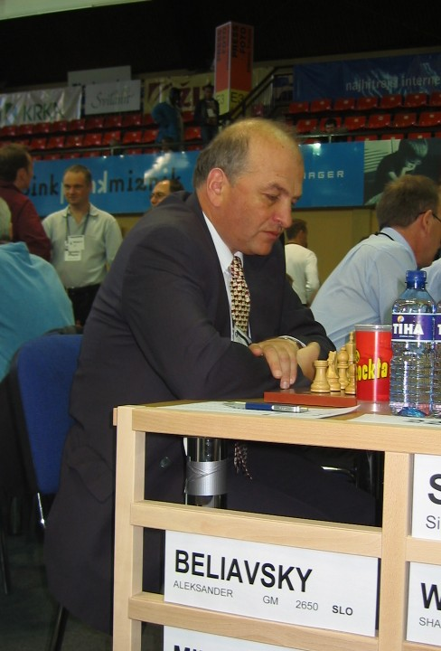 Alexander Beliavsky Ukrainian - Slovene Chess Grandmaster